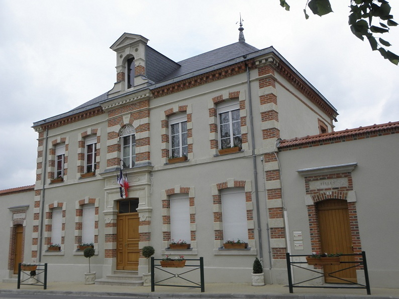 Mairie de Sacy (51).